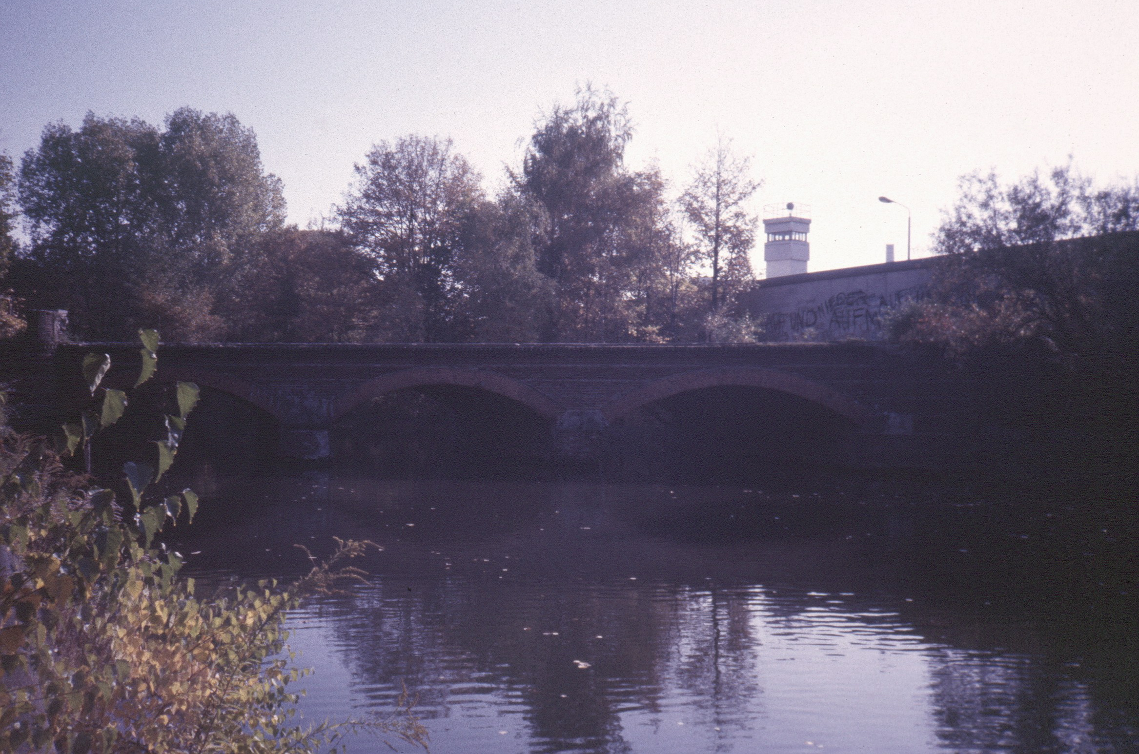 Treptower Brücke in Berlin-Kreuzberg